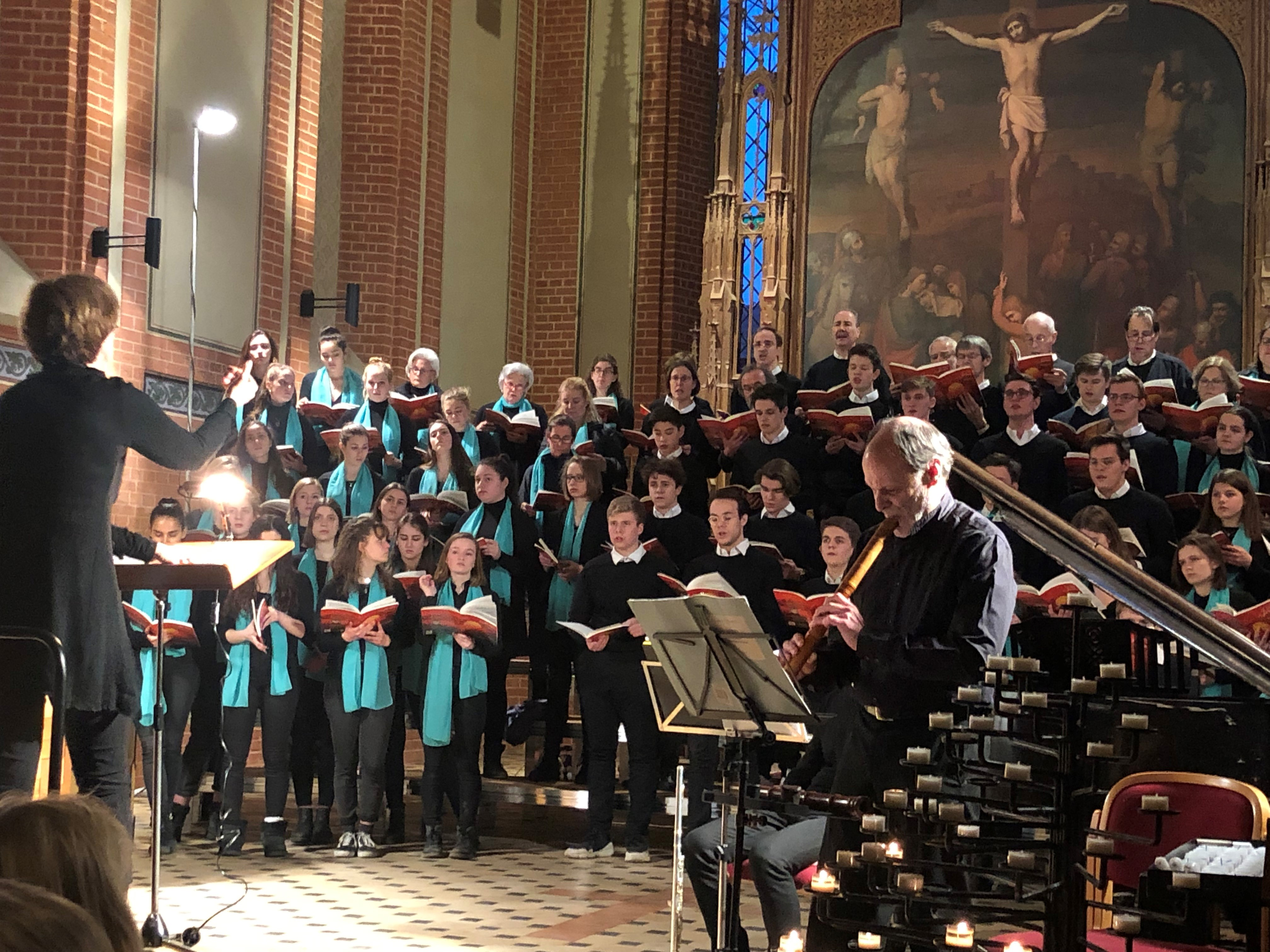 Unter der Leitung von Verena Pünder führen der Sophie-Barat-Chor und Jim Franklin in der Plauer Marienkirche das Requiem von Karl Jenkins auf.